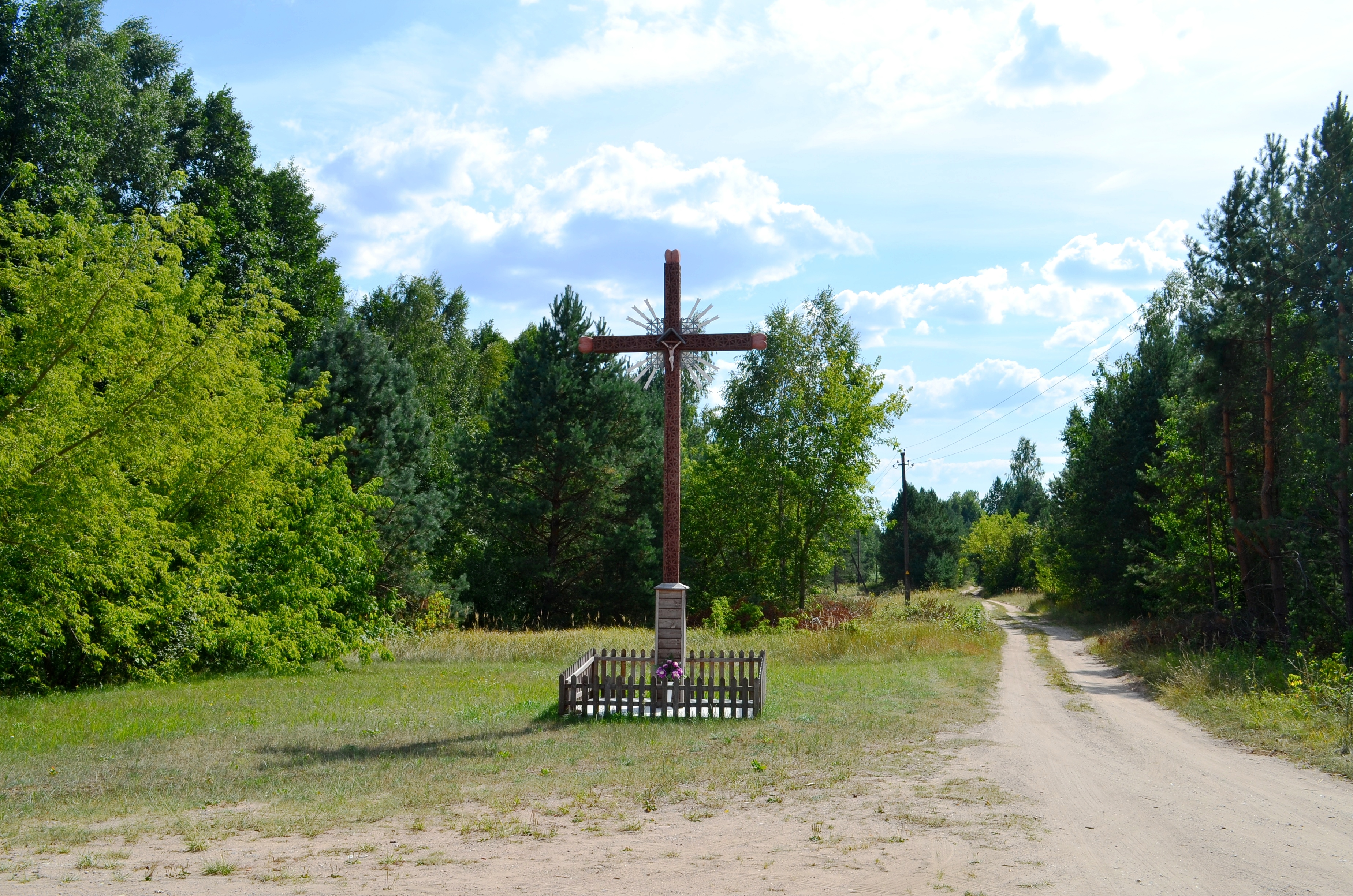 Kryžius šalia kryžkelės, Grybaulia, Varėnos r.